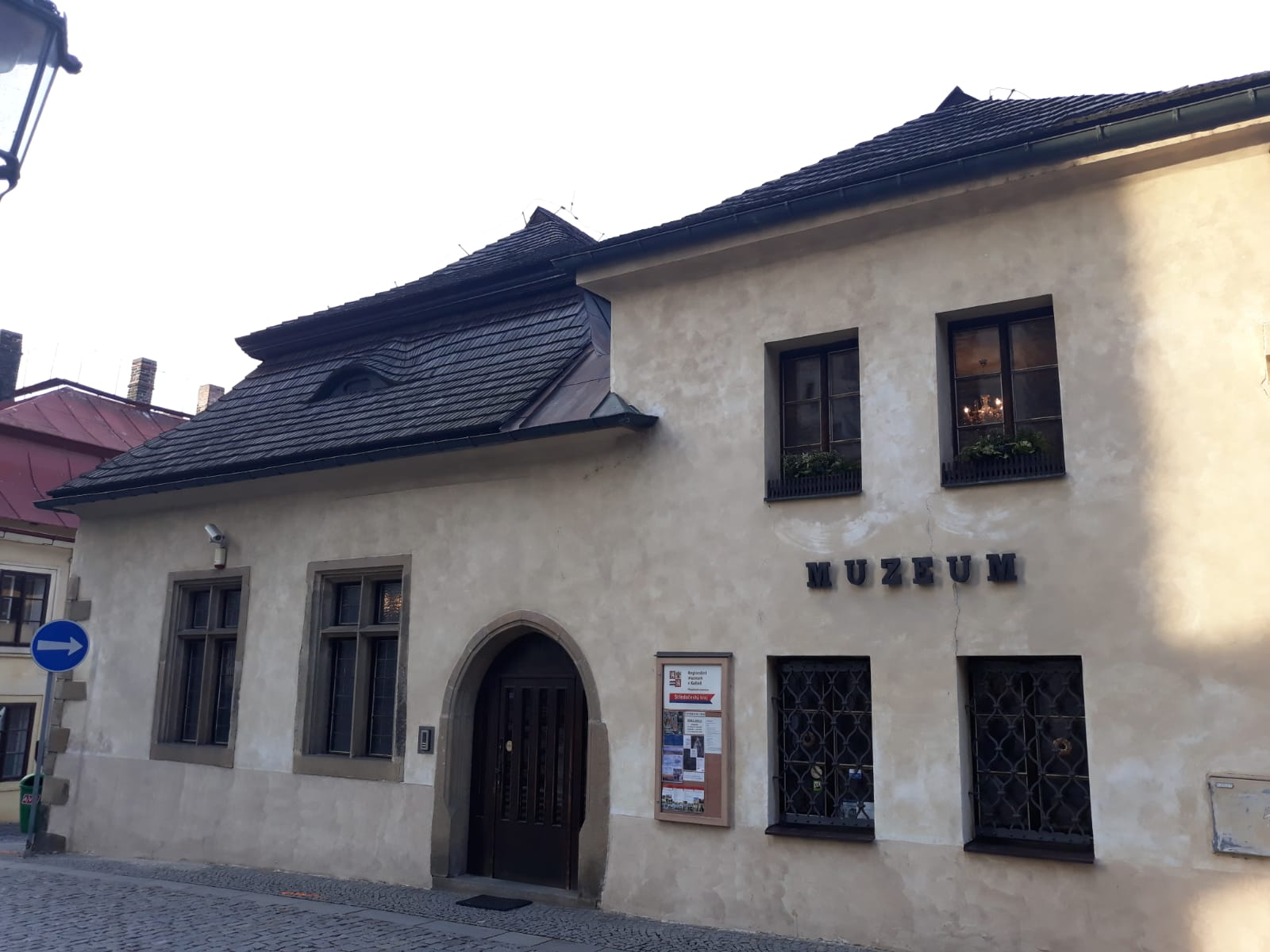 Červinkovský dům, Brandlova 25